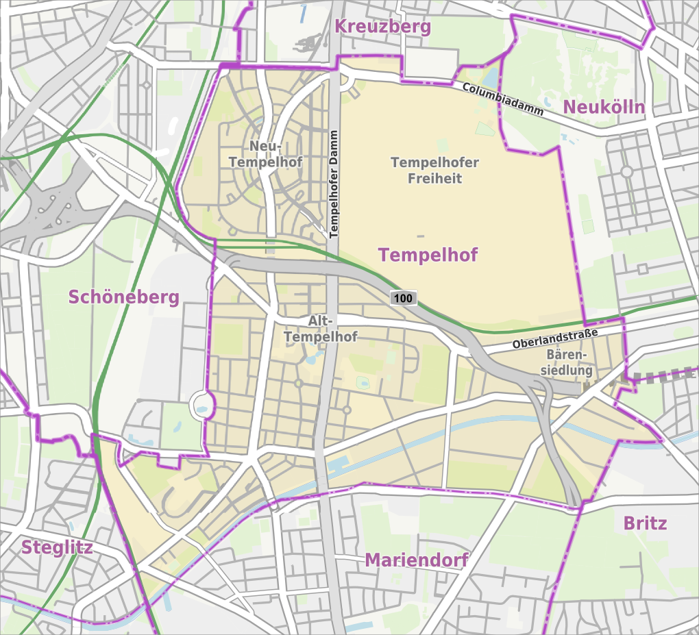 Übersichtskarte der Straßen und Ortslagen in Berlin-Tempelhof